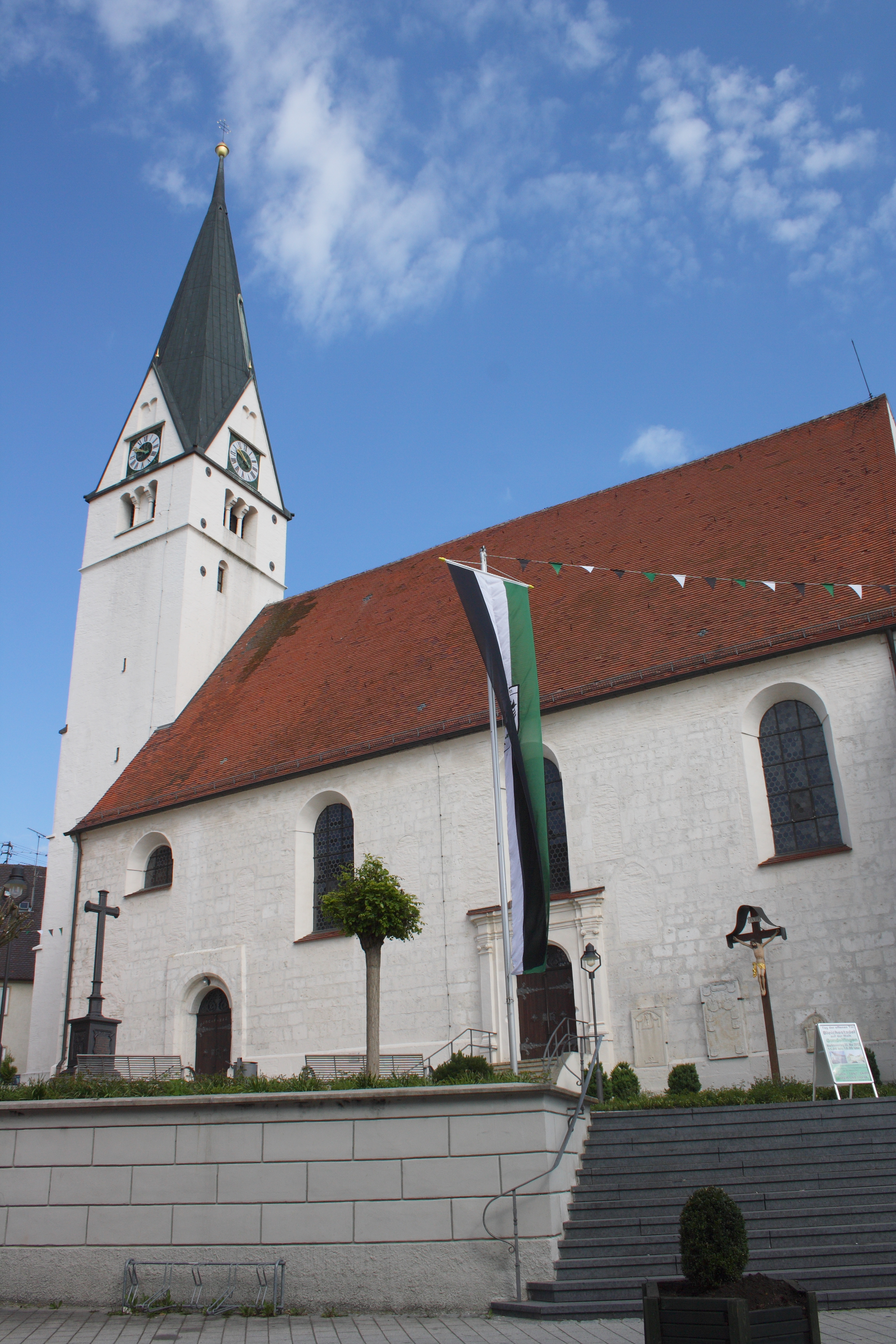 katholische Stadtpfarrkirche St. Martin in Gundelfingen an der Donau